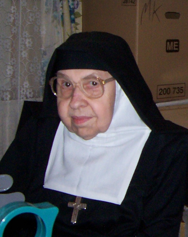 15. května 2007 Matka Imelda Maria Bezděková před stěhováním kláštera na Chlumci u Ústí nad Labem do Kroměříže